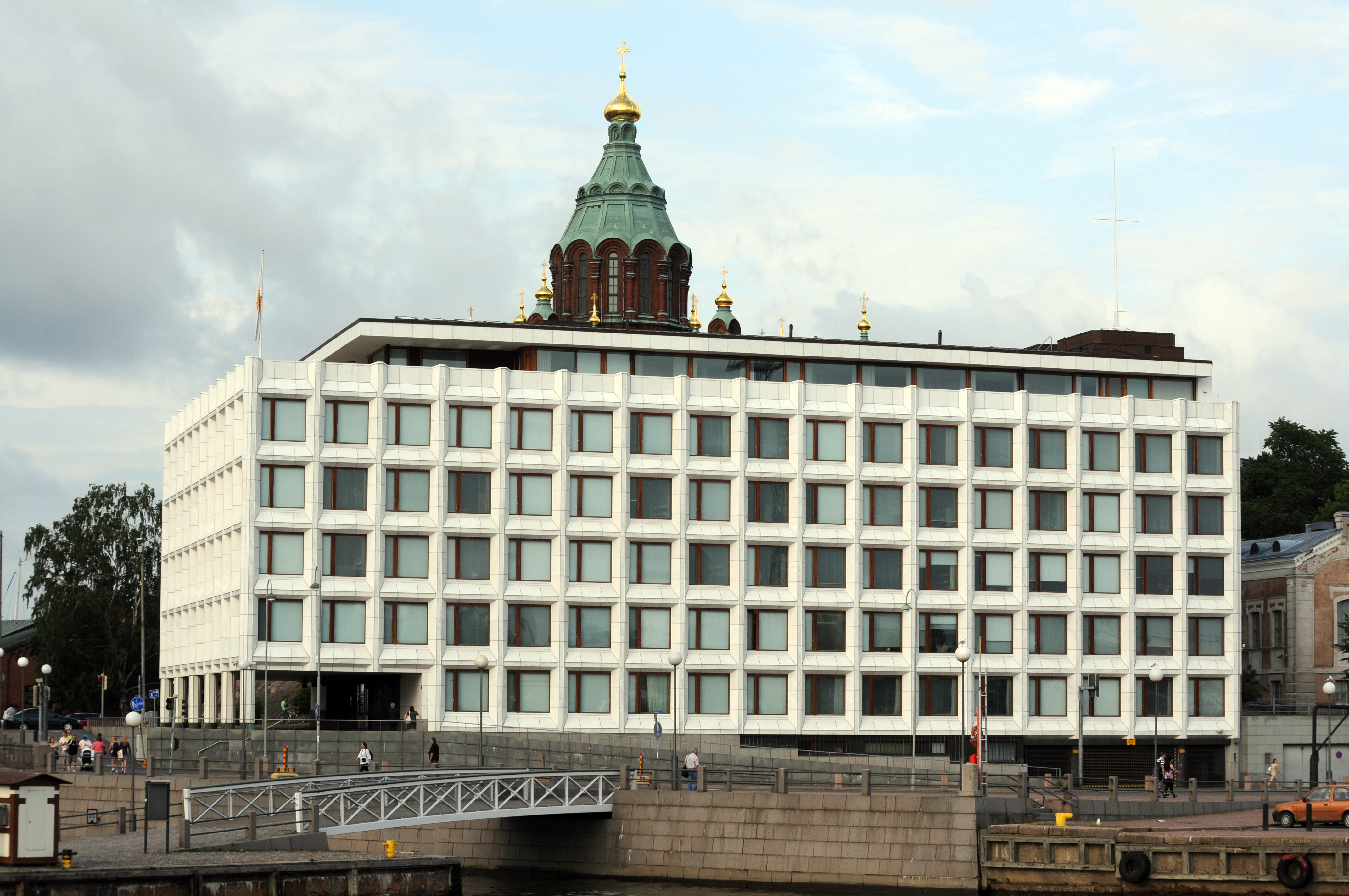 Helsinki; Hauptquartier von Stora Enso